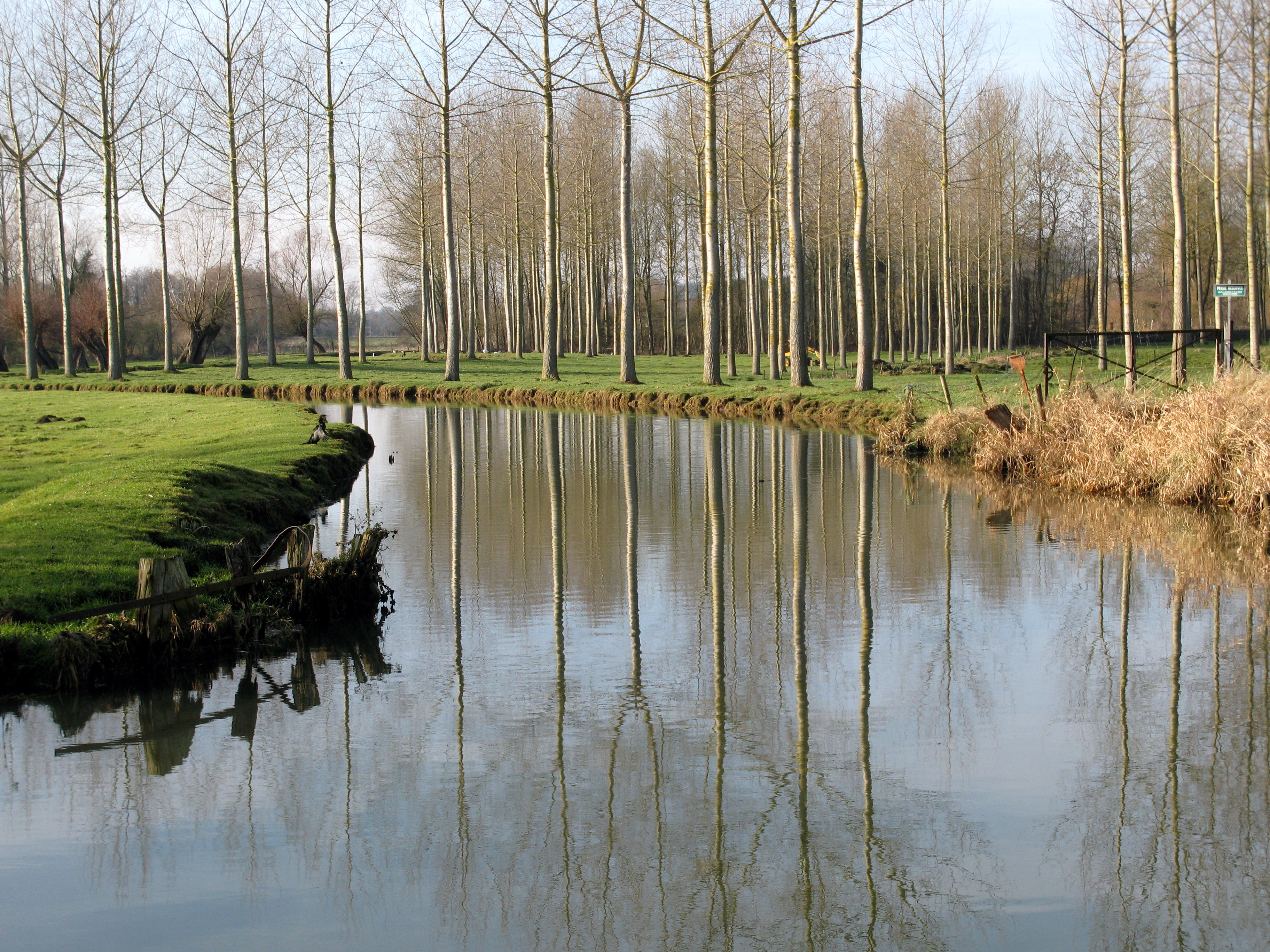 D'Mehaigne am Millegruef op der Mille vu Vélupont